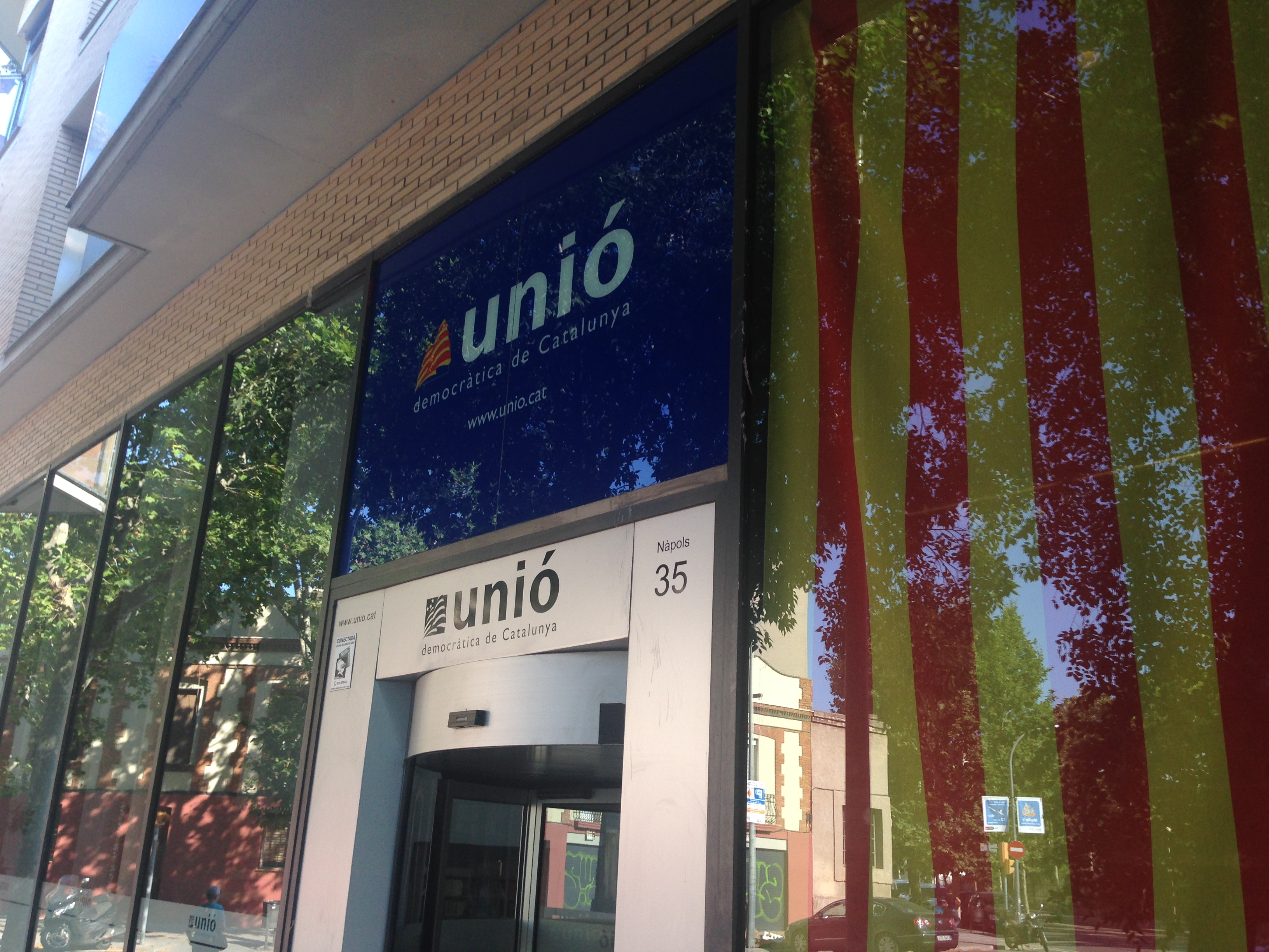 Seu d'UDC a Barcelona